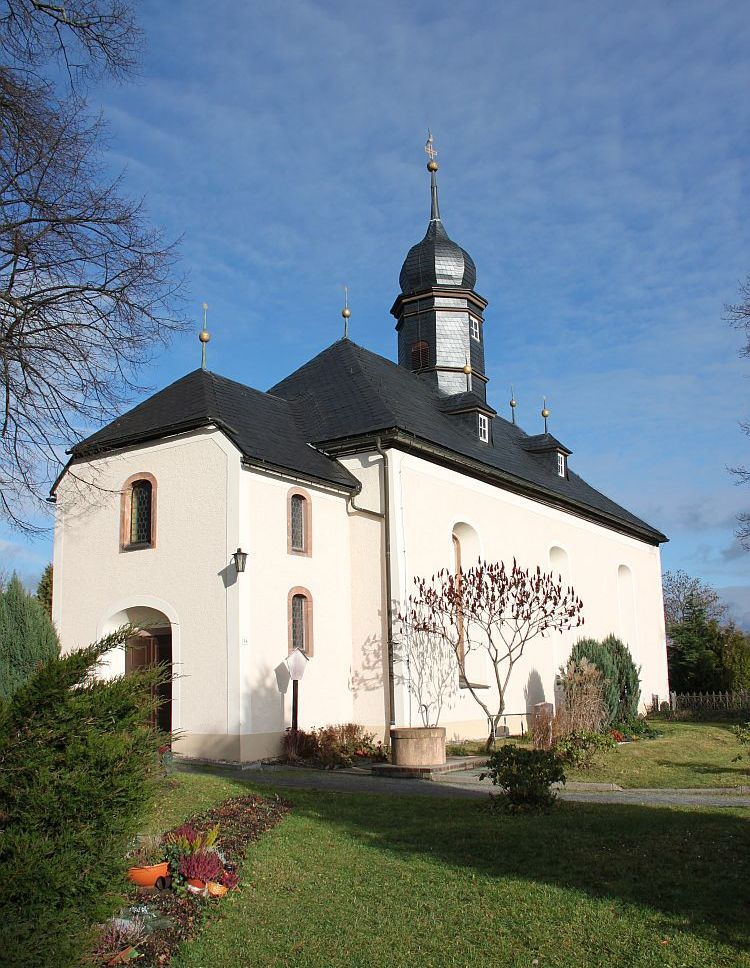 St. Blasius in Zwönitz